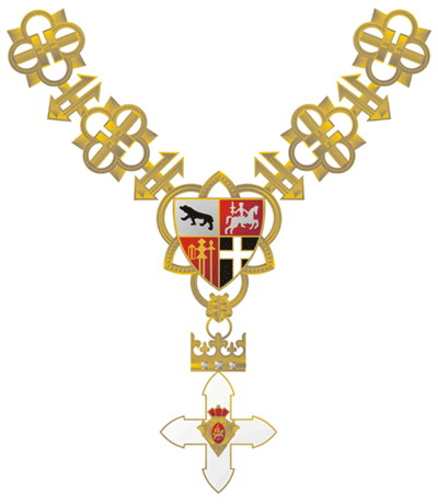 agrandissement d'une partie de l'Ordre avec Chaîne d'Or.